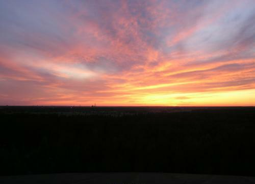 sunset in Pori, Finland